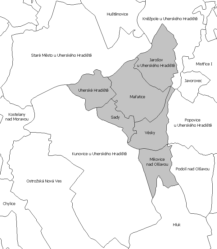 Katastrální území Uherského Hradiště, Kunovic a Starého Města